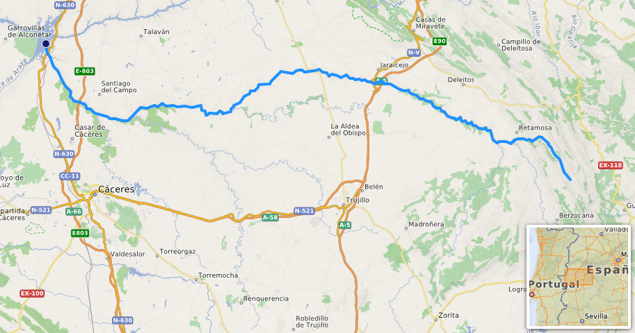 carte réalisée sur umap [1] This map may be incomplete, and may contain errors. Don't rely solely on it for navigation.